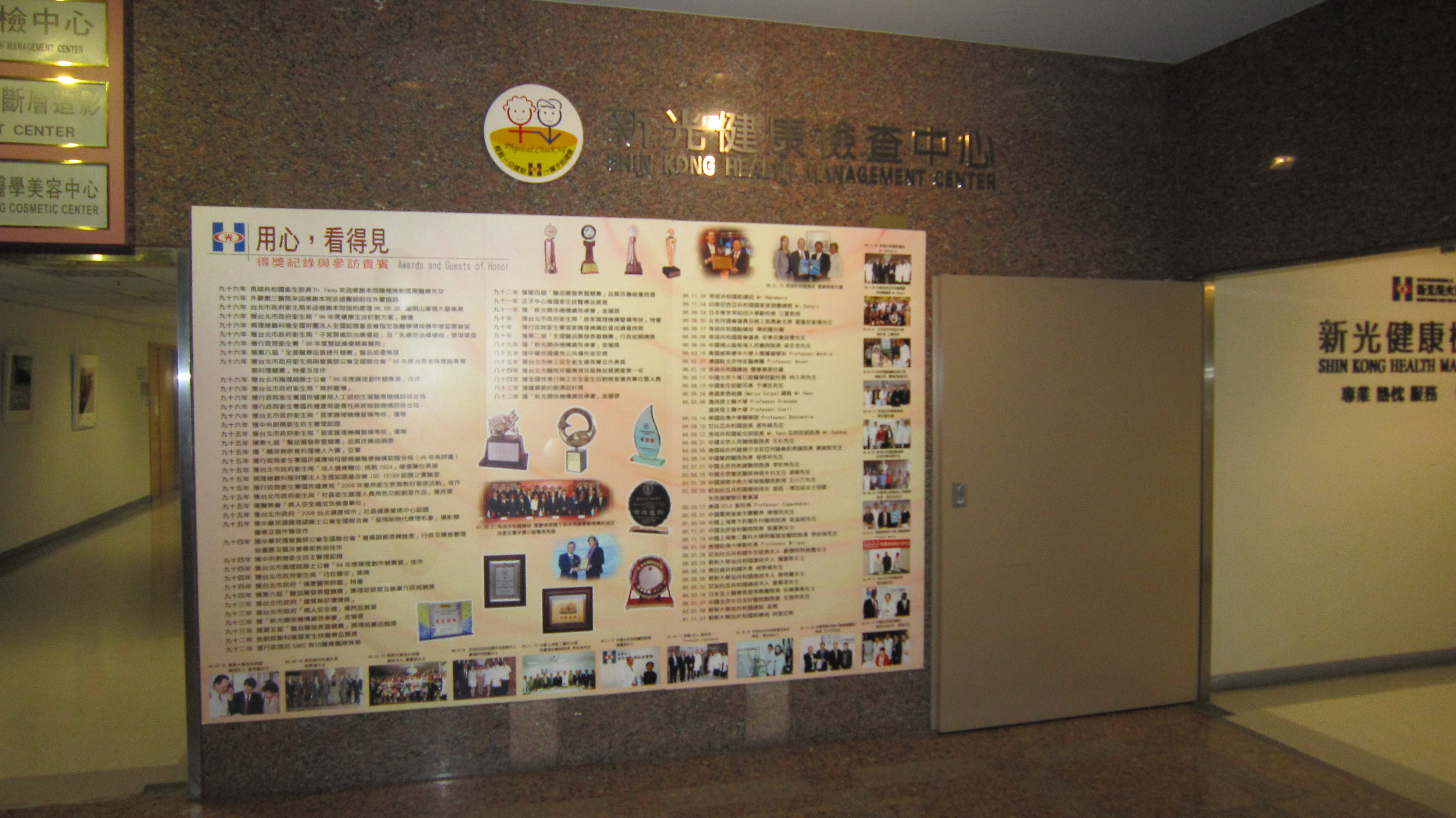 士林區新光醫院